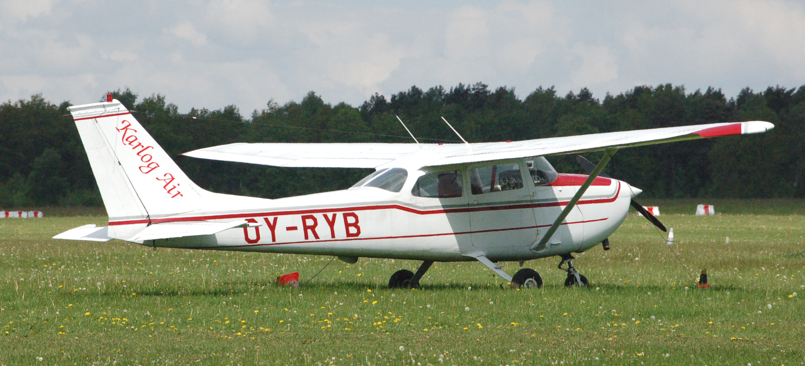 Cessna 1572 (OY-RYB) auf dem Flugplatz Uetersen